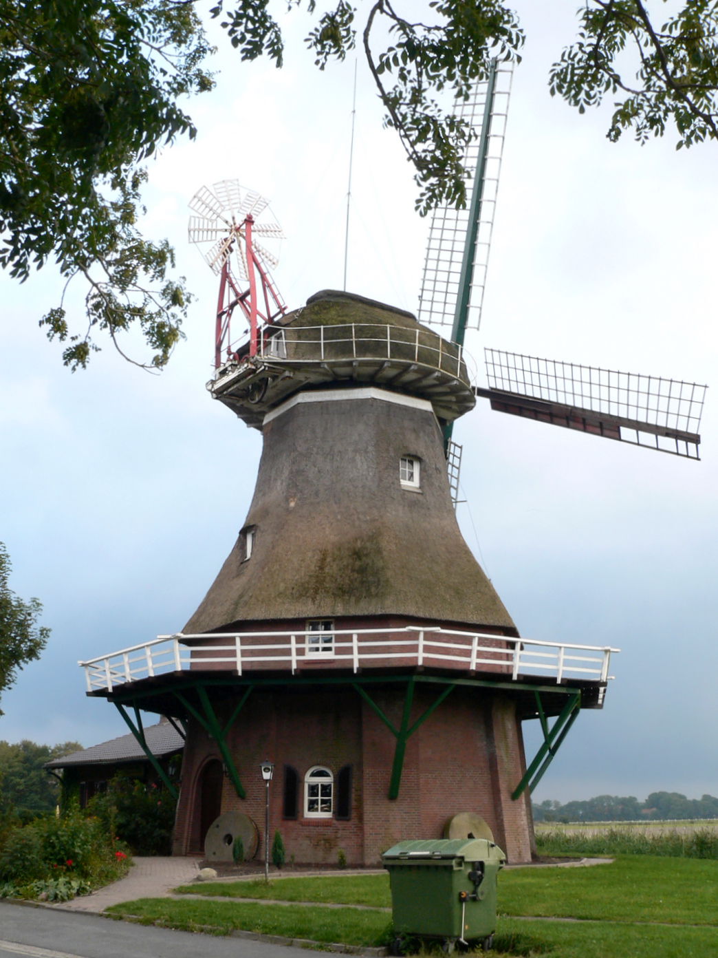 Stumpenser Mühle kurz vor einem Gewitter